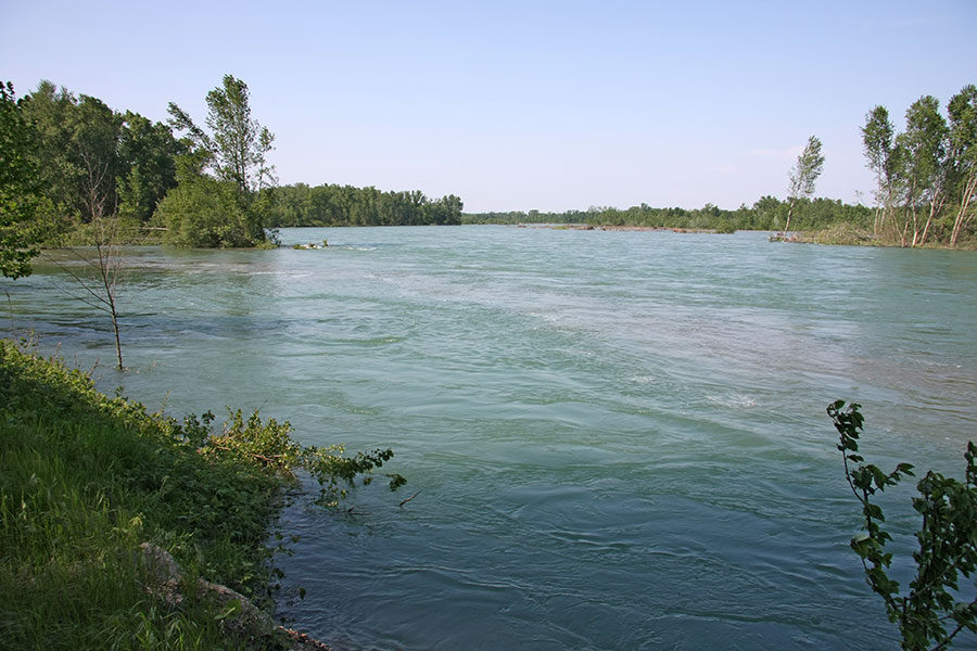 Il fiume Ticino in piena a Cerano durante i primi giorni di maggio del 2009